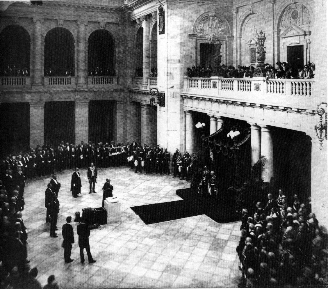 Leipzig: Einweihung des Reichsgerichts im Jahre 1895.